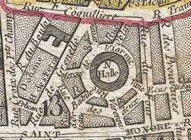 La Halle aux blés et son quartier à la fin du XVIIIè siècle. Extrait du plan de Paris "chez Jean", 1797.